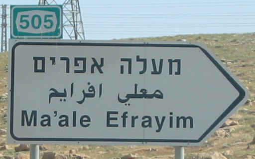 Trilingual Maaleh Efrayim road sign